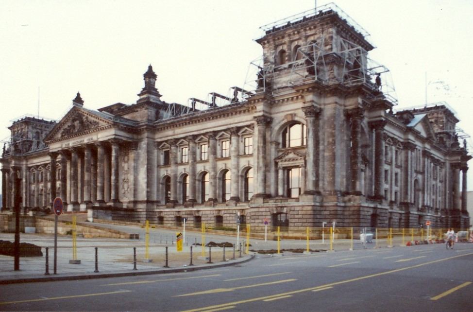 Beginn der Reichstagverhüllung